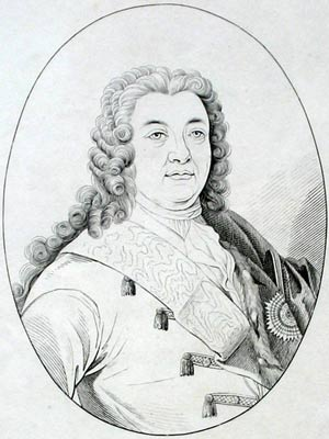 Алексей Черкасский, канцлер Российской империи